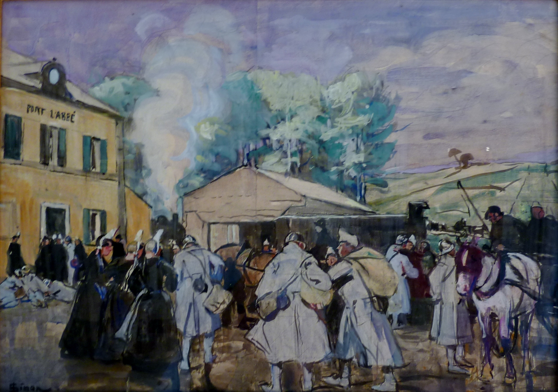 Départ des permissionnaires de la grande Guerre à la gare de Pont-l'Abbétitle QS:P1476,fr:"Départ des permissionnaires de la grande Guerre à la gare de Pont-l'Abbé" label QS:Lfr,"Départ des permissionnaires de la grande Guerre à la gare de Pont-l'Abbé"